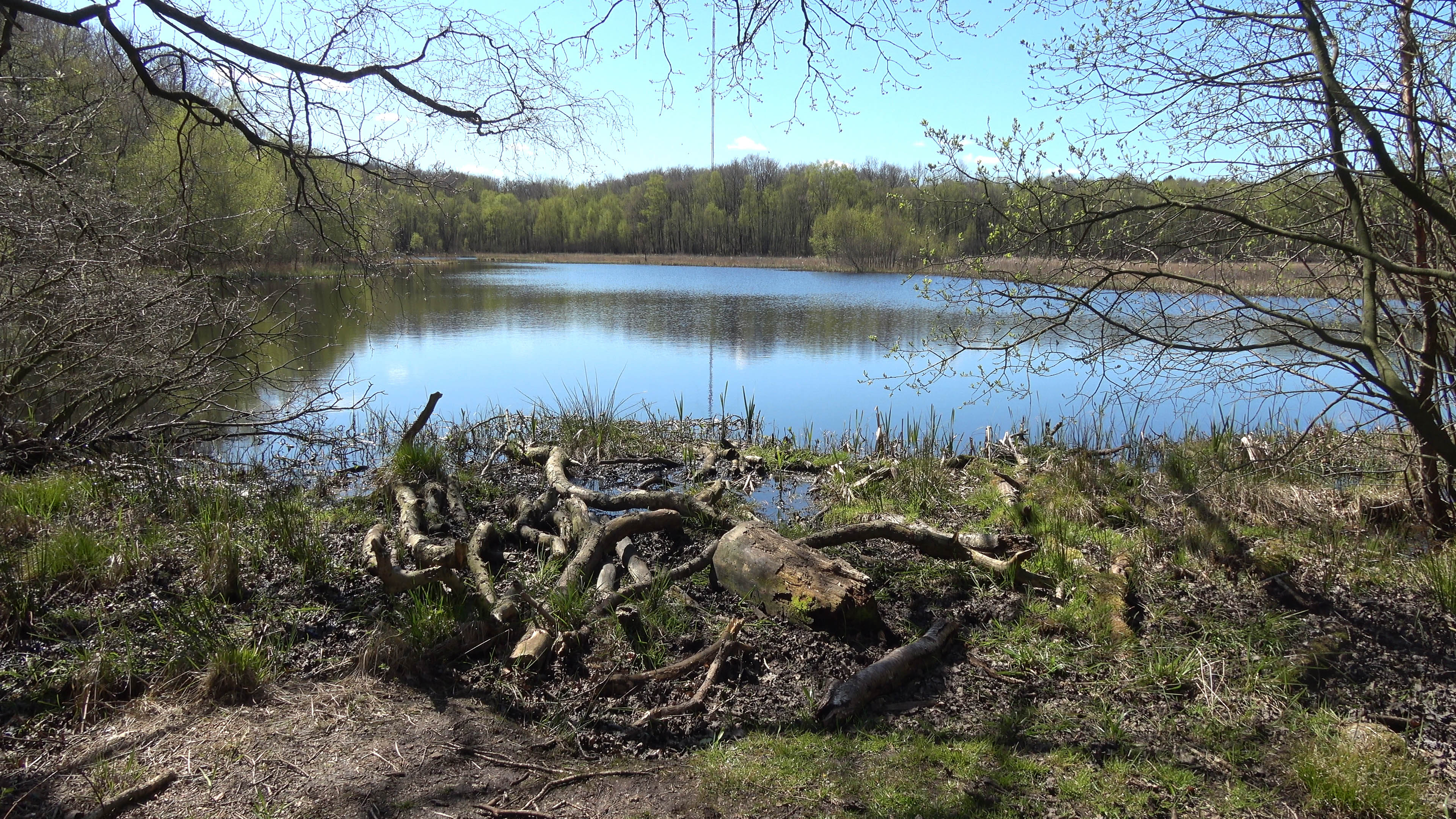 Dieser Platz ist für eine Aussichtsplattform vorgesehen.